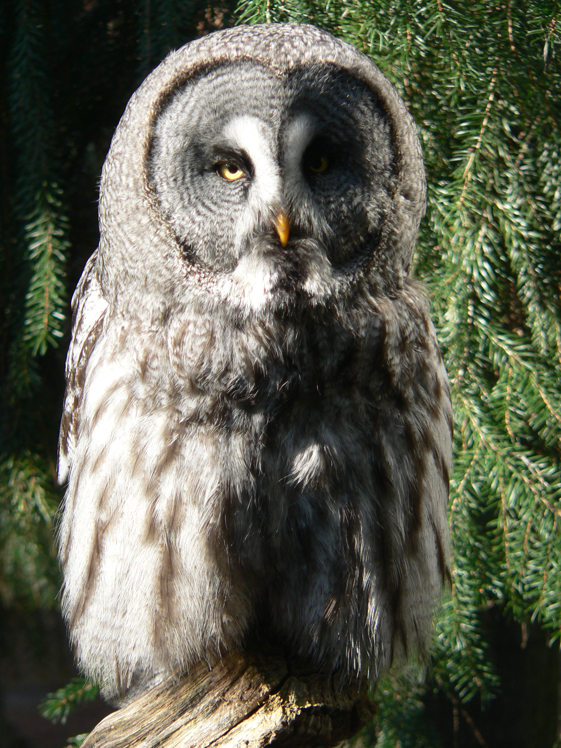 Strix nebulosa